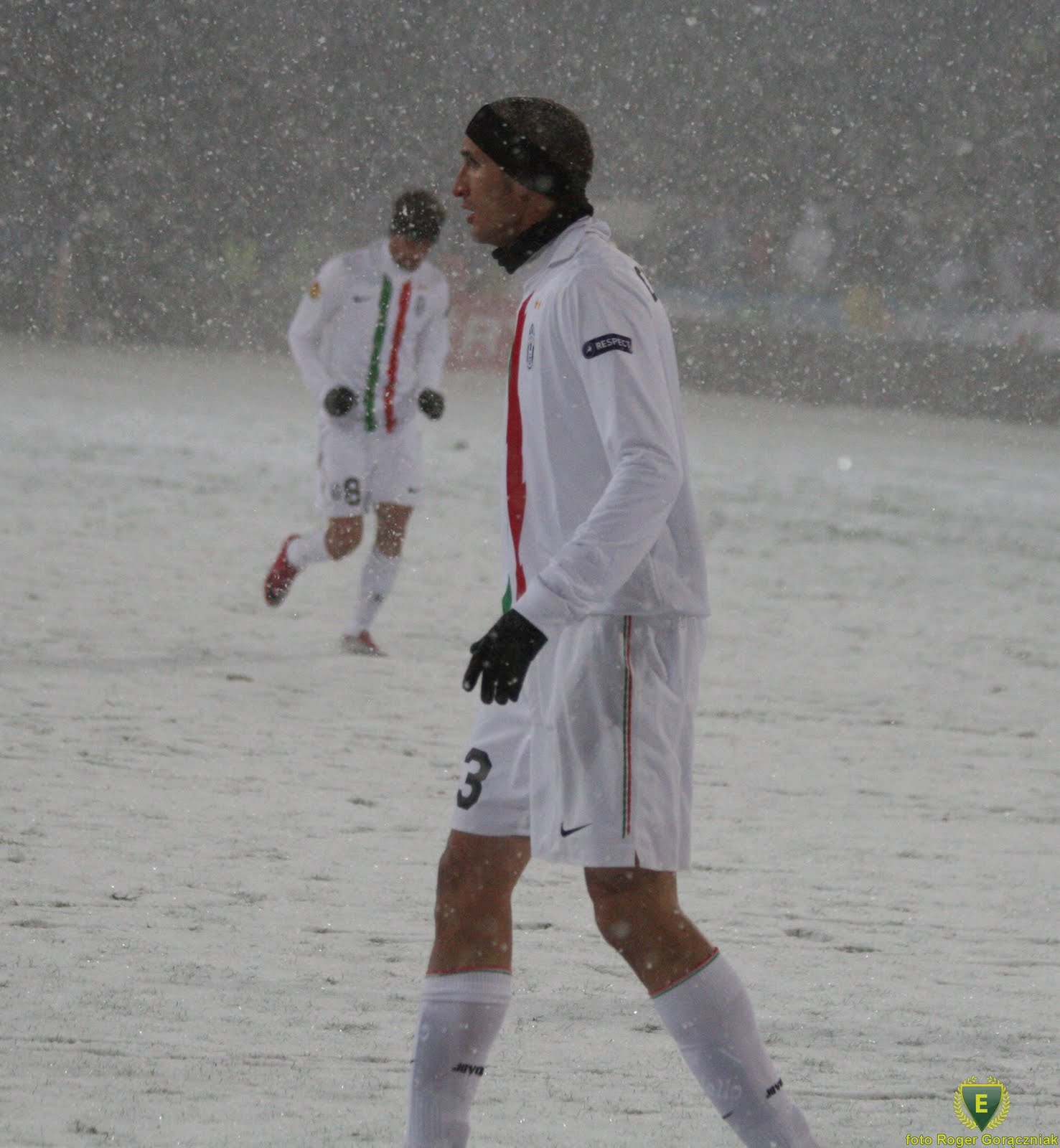 Chiellini nella sfida di Europa League